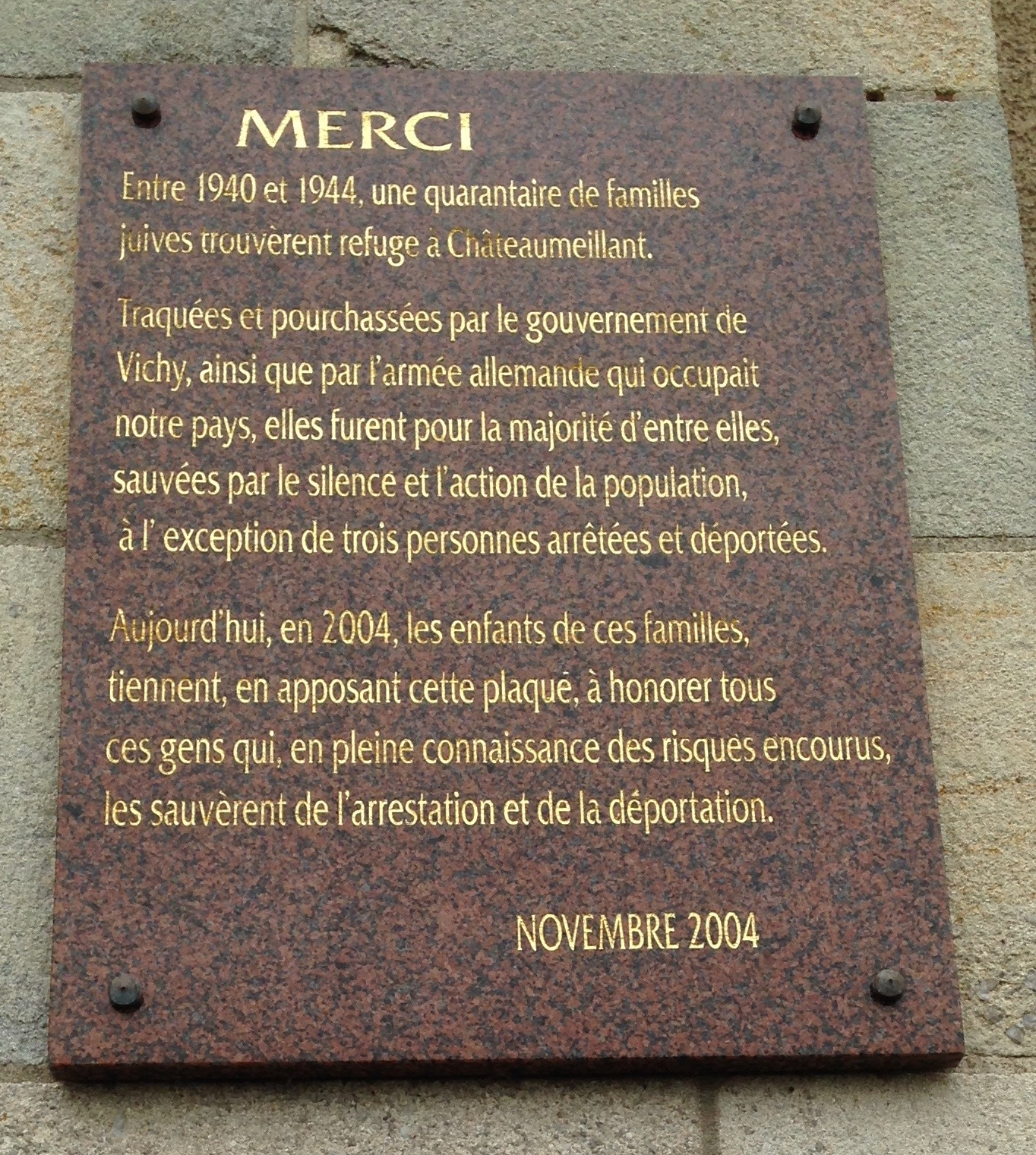 Plaque-Remerciement-Châteaumeillant